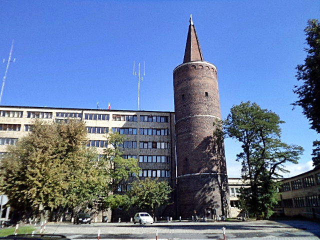 Wieża zamku piastowskiego "Na Ostrówku" (Piastowska), mur., kon. XIII, XX Opole, ul. Piastowska, Opole